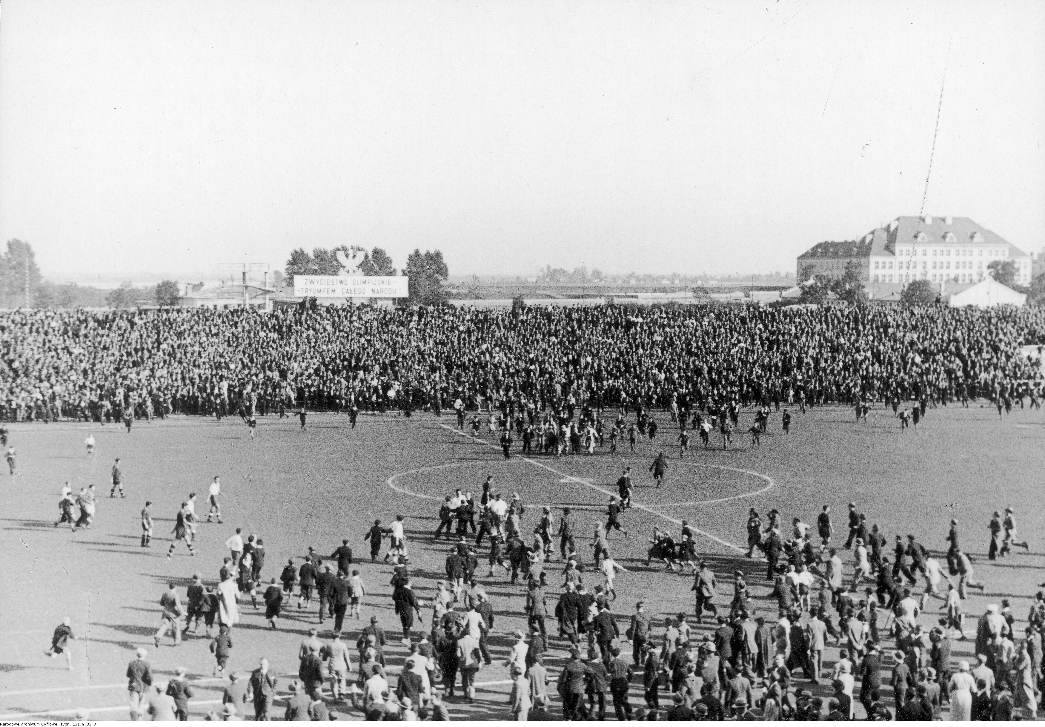 Po meczu piłki nożnej [na stadionie Legii w Warszawie].